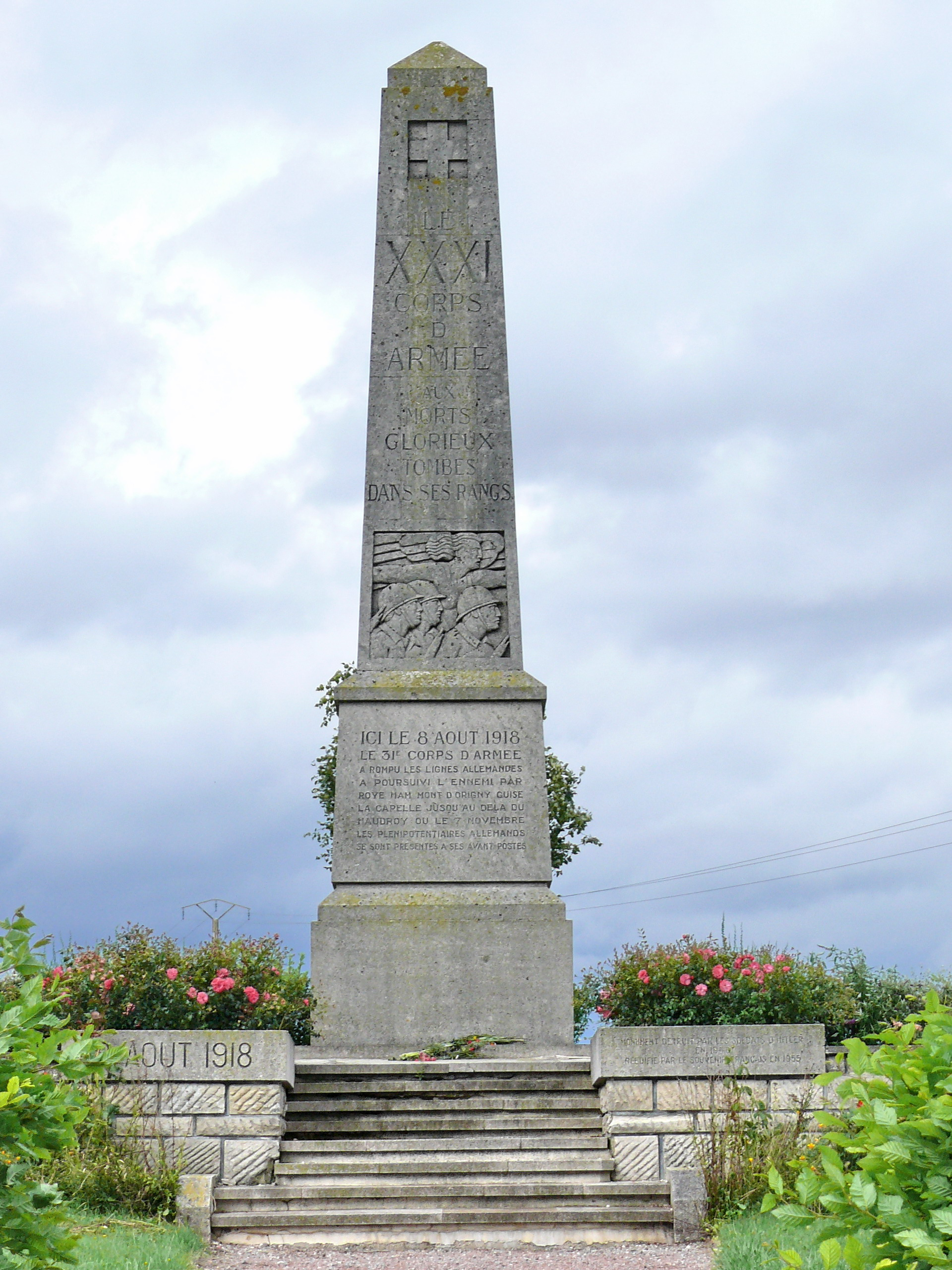 Moreuil (Somme - Picardie - France) Monument commémoratif du 31e corps d'armée : "Ici, le 31e corps d'armée à rompu les ligbnes allemandes, à poursuivi l'ennemi par Roye, Ham, Mont-d'Origny, Guise, La Capelle jusqu'au-delà du Houdroy où le 7 novembre, les plénipotentiaires allemands se sont présentés à ses avants-postes"